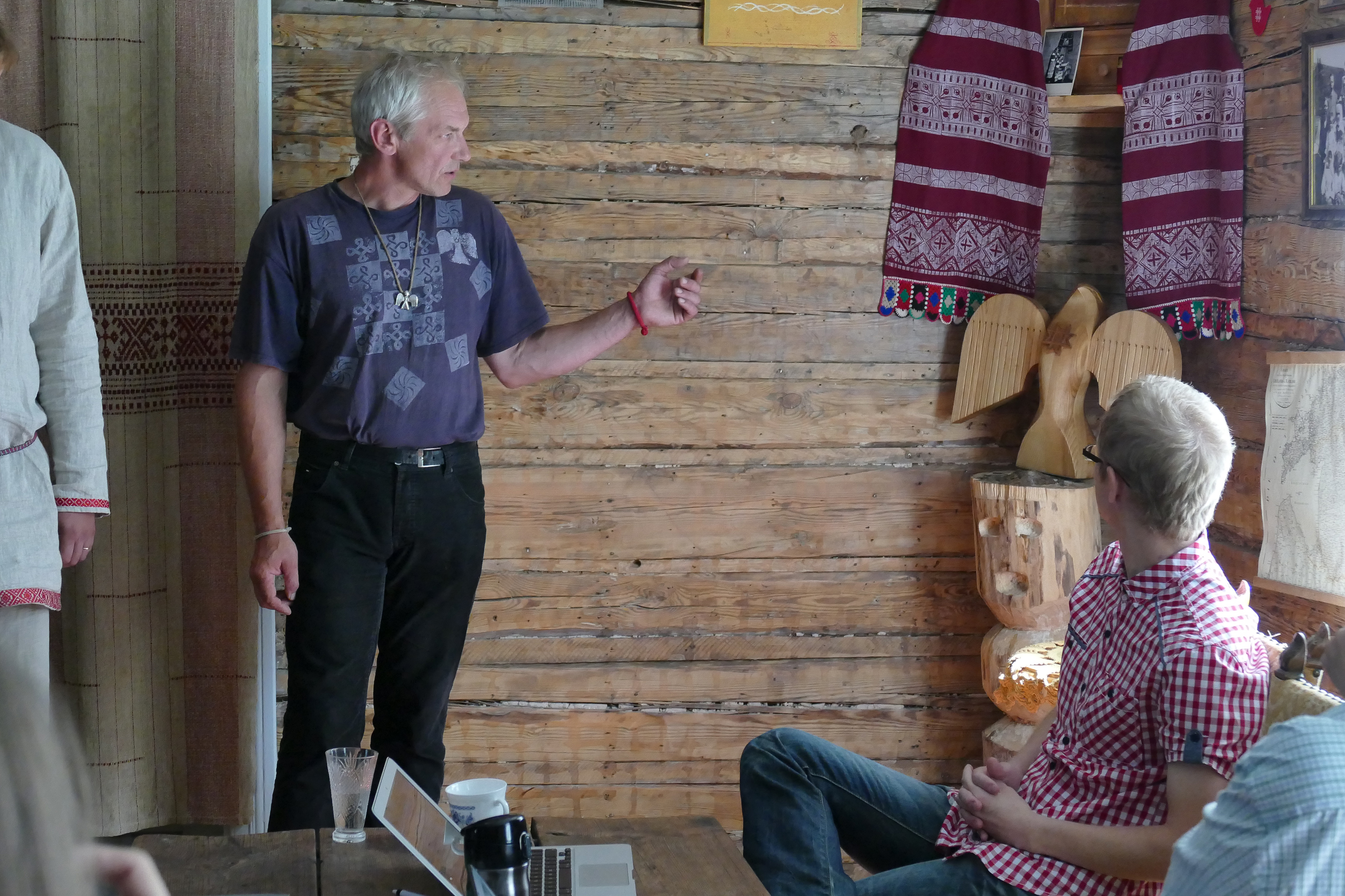 Soome-ugri vikiseminari avamine Obinitsas.